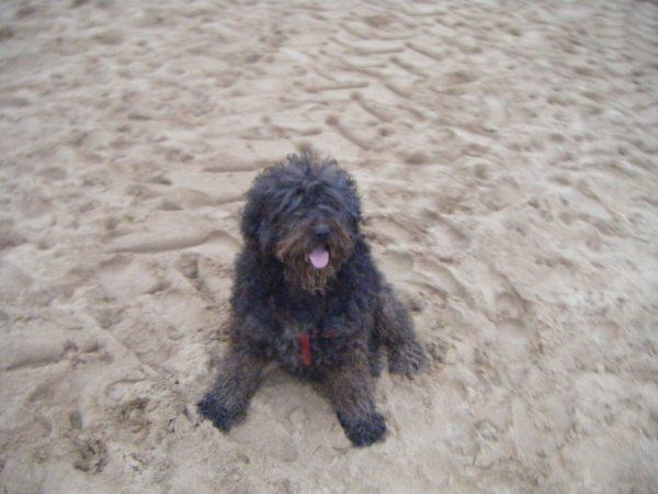 Hembra, perro de agua español